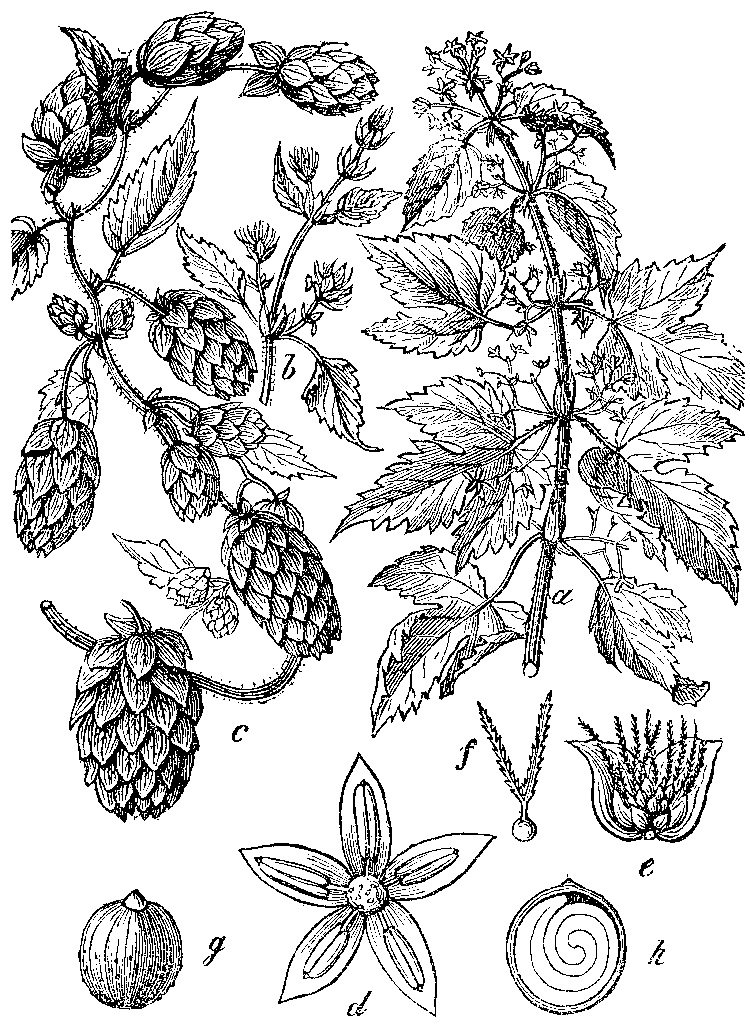 Slika 107. Hmelj (Húmulus Lúpulus.)